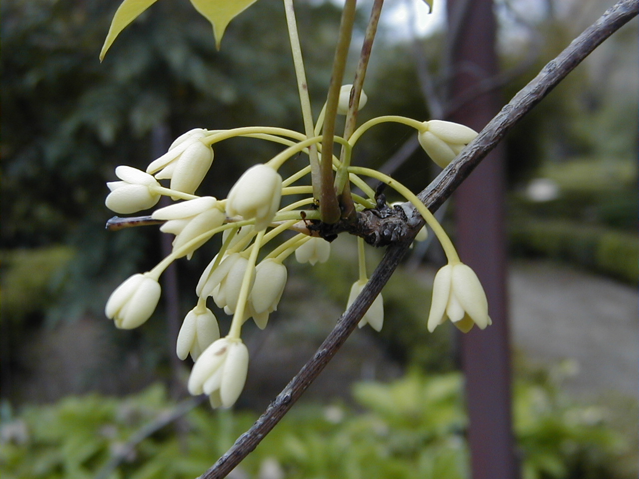 Holboellia coriacea. Real Jardín Botánico, Madrid, España.